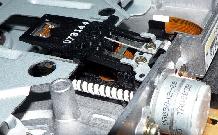 hardware fdd parts - head